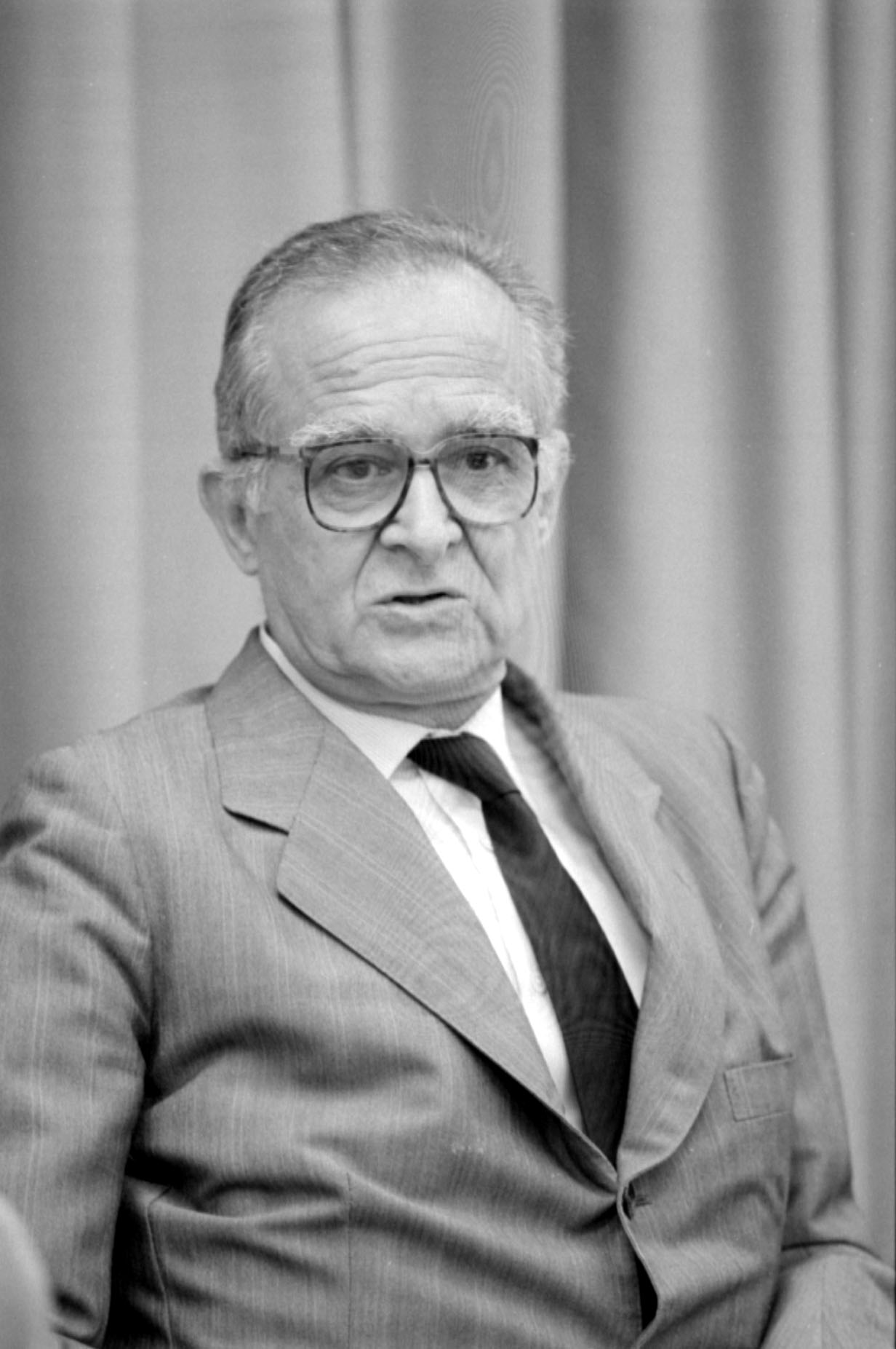 Antonio Valero, ingeniero industrial, catedrático y primer director general del IESE.